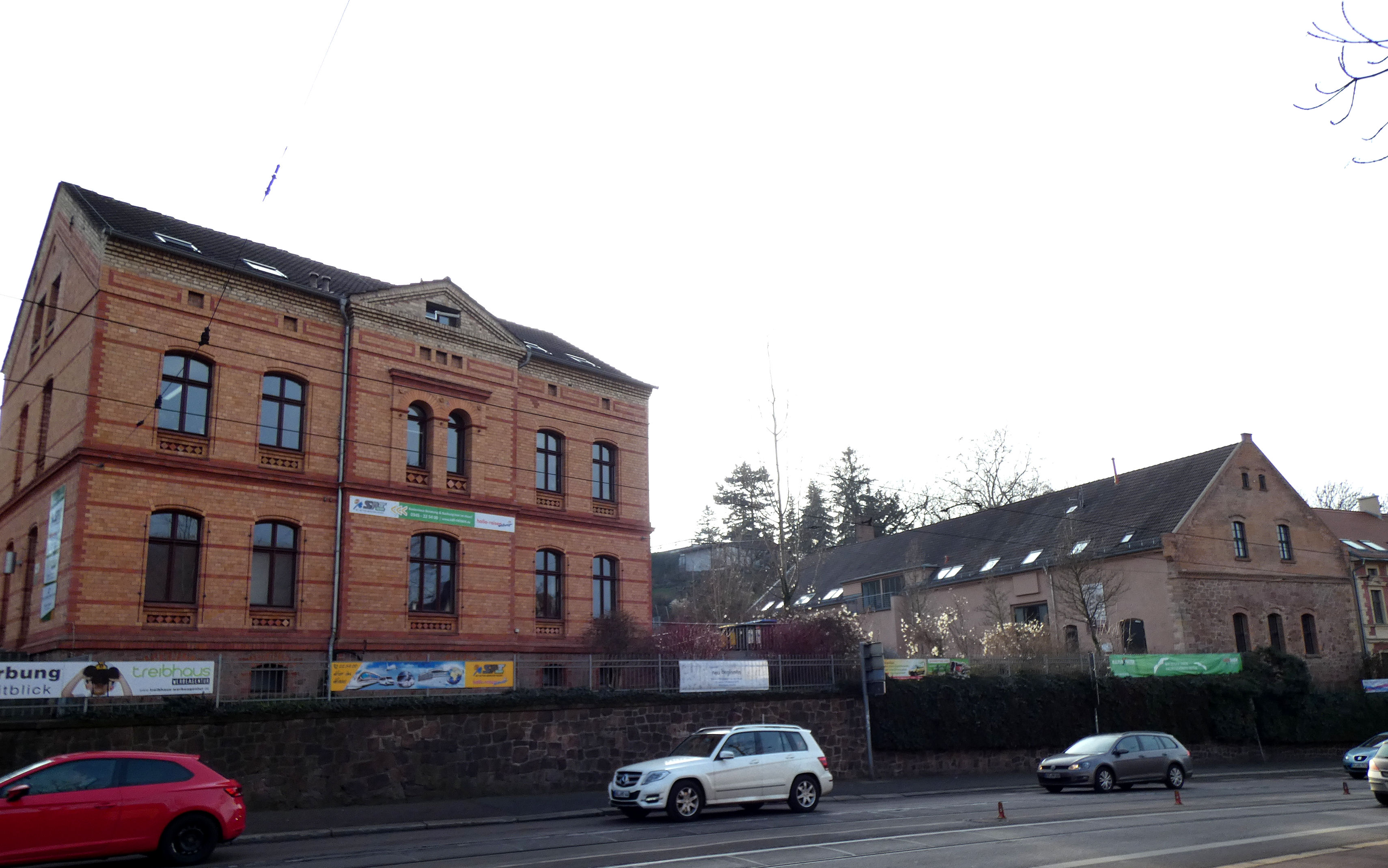 Fährstraße 1 (links) und 2a (rechts), Halle (Saale)